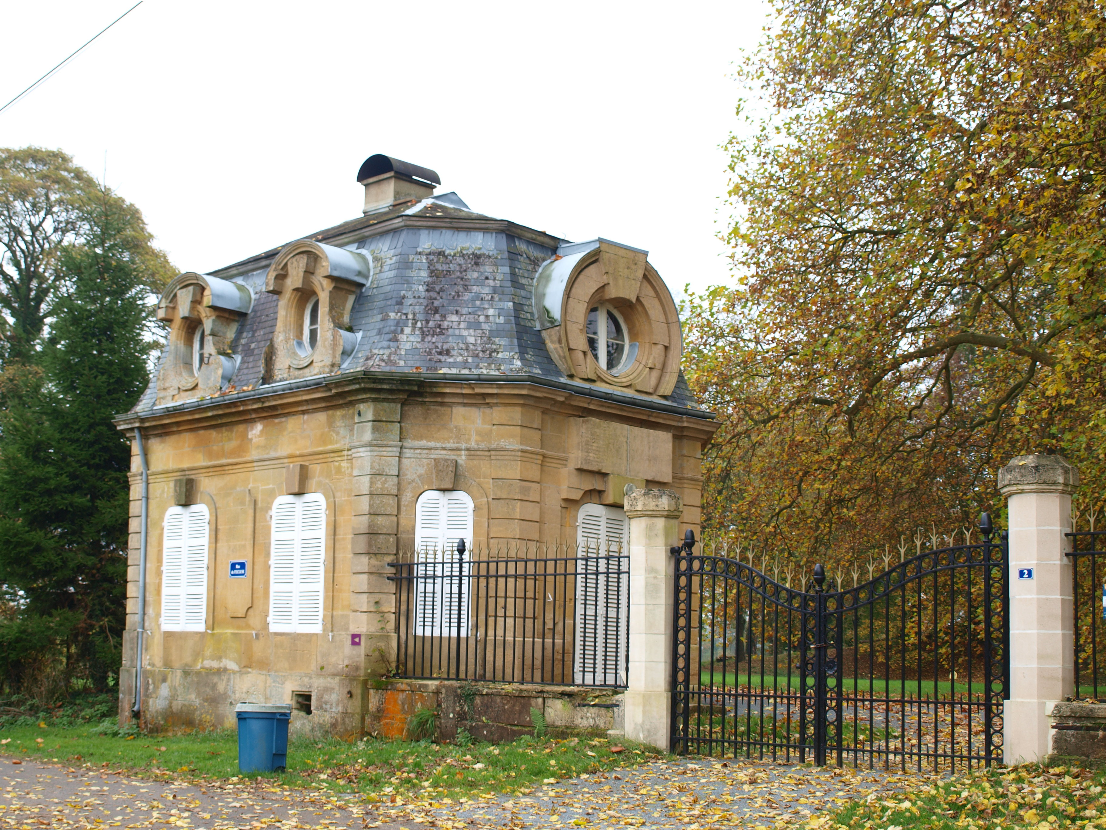 La Cassine (Vendresse, Ardennes, France) ; pavillon du château